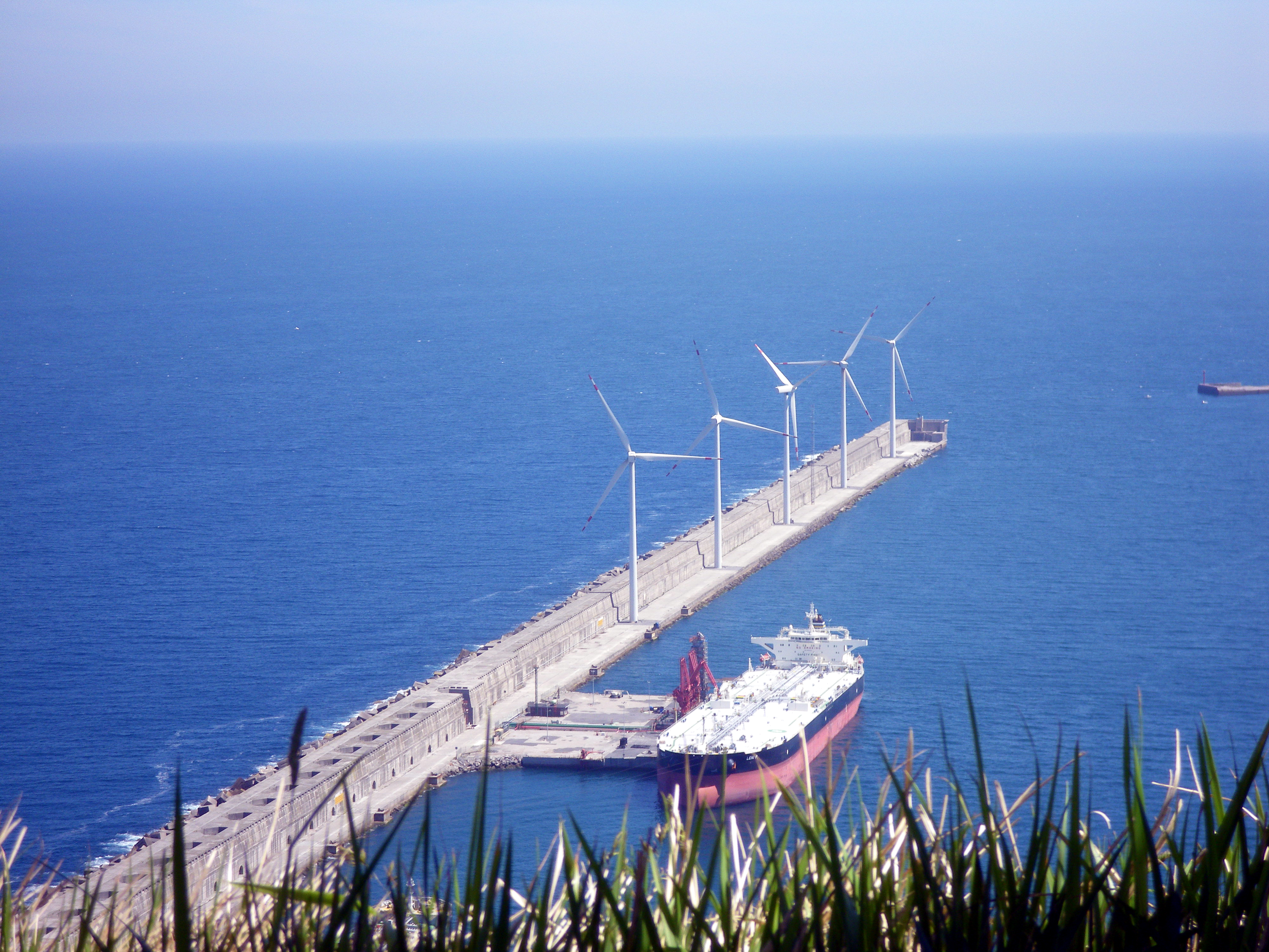 Bilboko kanpoko portuaren parke eolikoa, Argizagi menditik ikusita (Zierbena, Bizkaia).